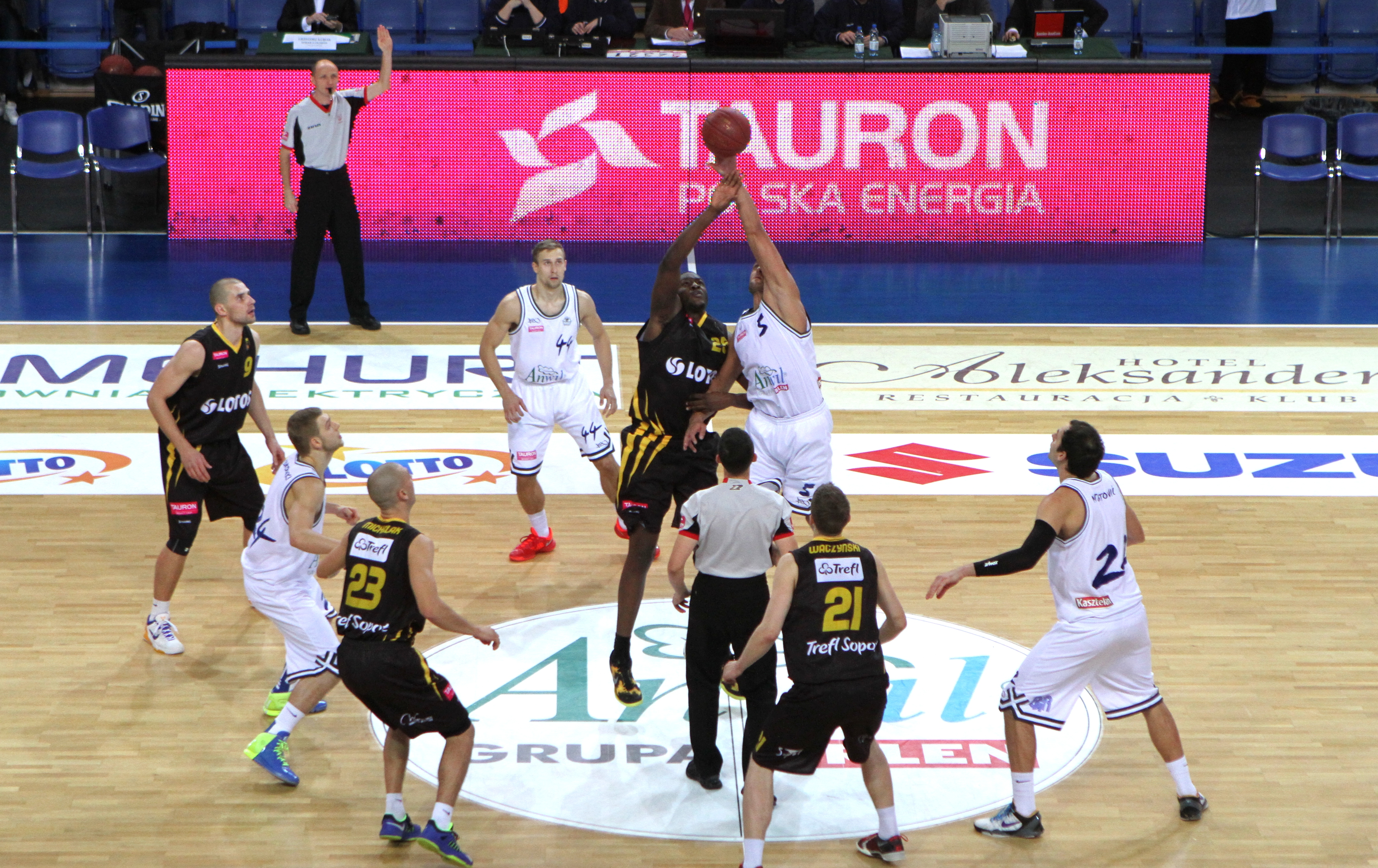 Anwil Włocławek - Treﬂ Sopot, Tauron Basket Liga